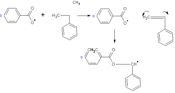 polimerização radicalar